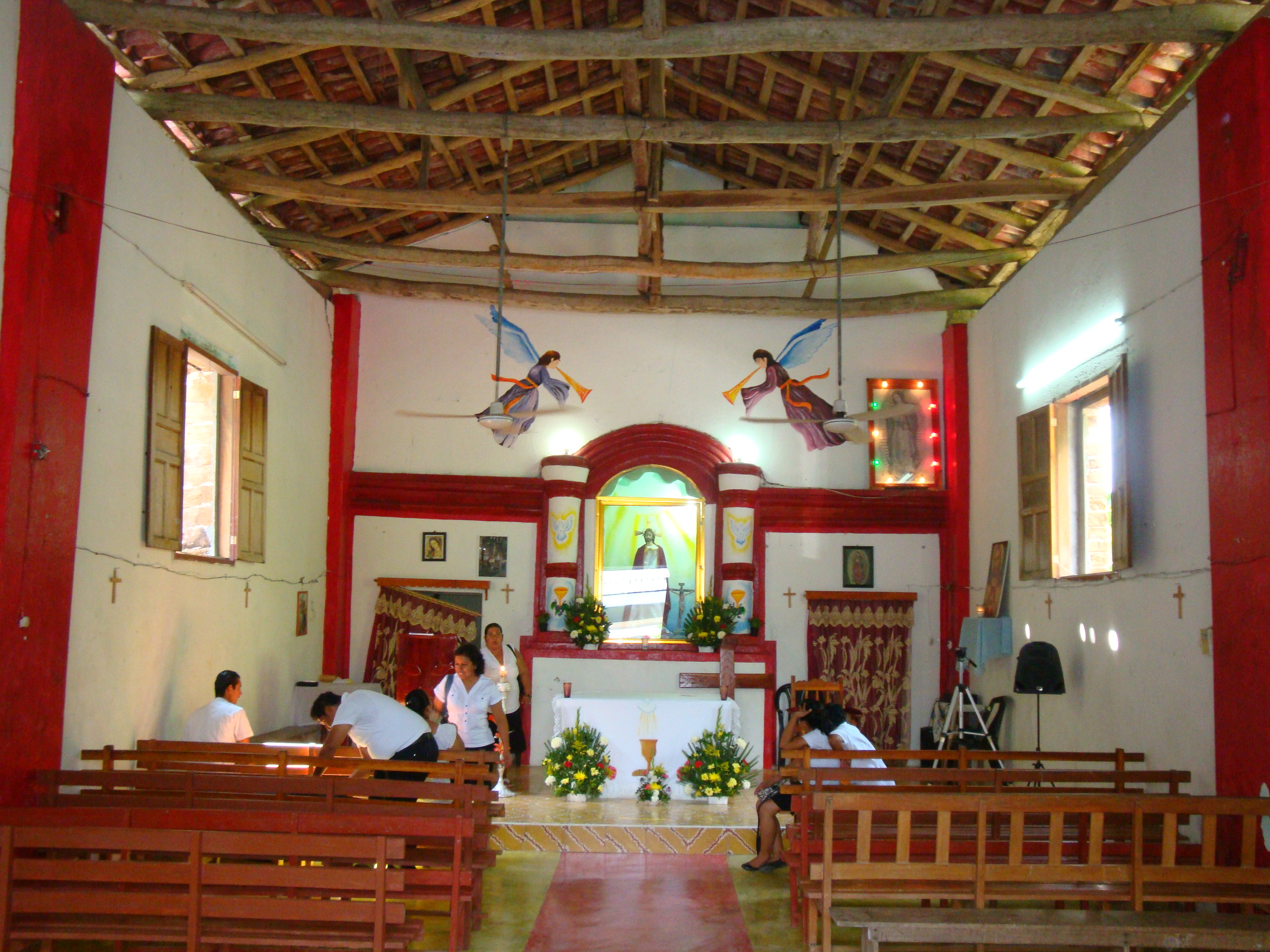 Interior de la Iglesia de Las Mirandillas, construida en 1724, municipio de Cunduacán, Tabasco, México.